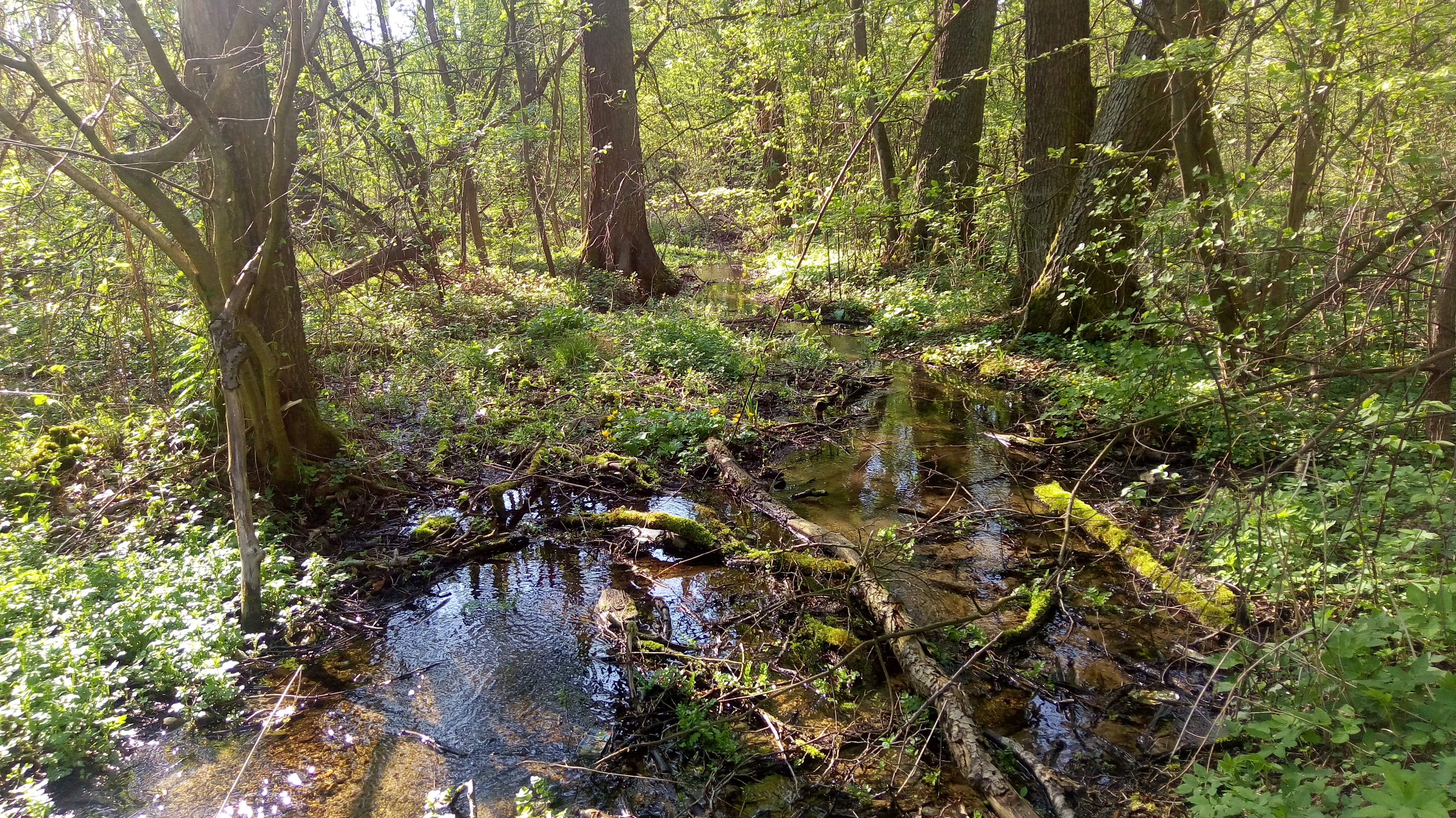 Rezerwat przyrody Uroczysko Bażantarnia w województwie łódzkim - dopływ rzeczki Uchanka